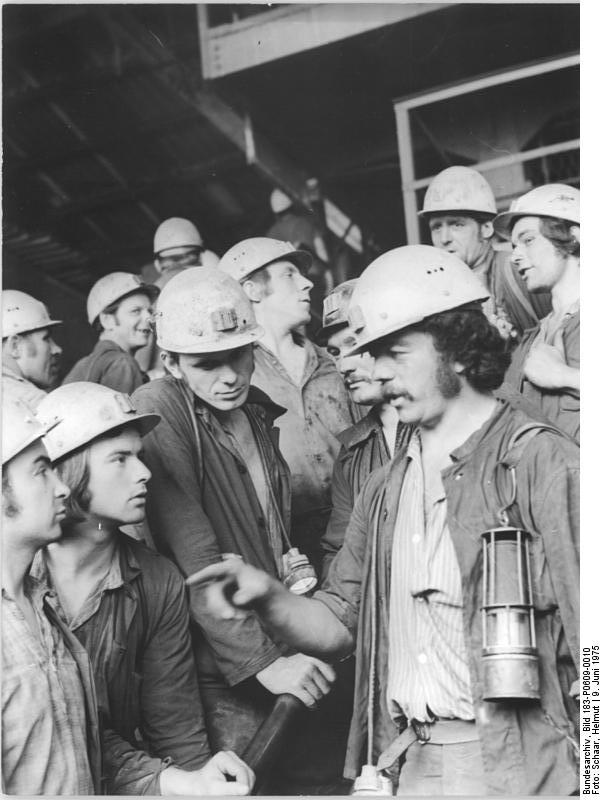 Niederröblingen, Schichtwechsel, Bergwerk ADN-ZB Schaar ku-Schm 9.6.1975 Bez. Halle: Schichtwechsel im "Bernhard Koenen"-Schacht in Niederröblingen. Jugendbrigadier Jürgen Trümper (r.) übergibt kurze Informationen über die Ergebnisse der gefahrenen Schicht an den Brigadier Hans Schmidt (l.). Jürgen Trümper wird an der am 11.6.75 stattfindenden Vertrauensleute-Vollversammlung des Mansfeld-Kombinates "Wilhelm Pieck" als Delegierter seiner Brigade teilnehmen. "Uns Kumpels werden die Ergebnisse der 14. Tagung unseres Zentralkomitees zu größeren Leistungen bei der Planerfüllung anspornen", erklärt der Jugendbrigadier. (vergl. P0609-10N)